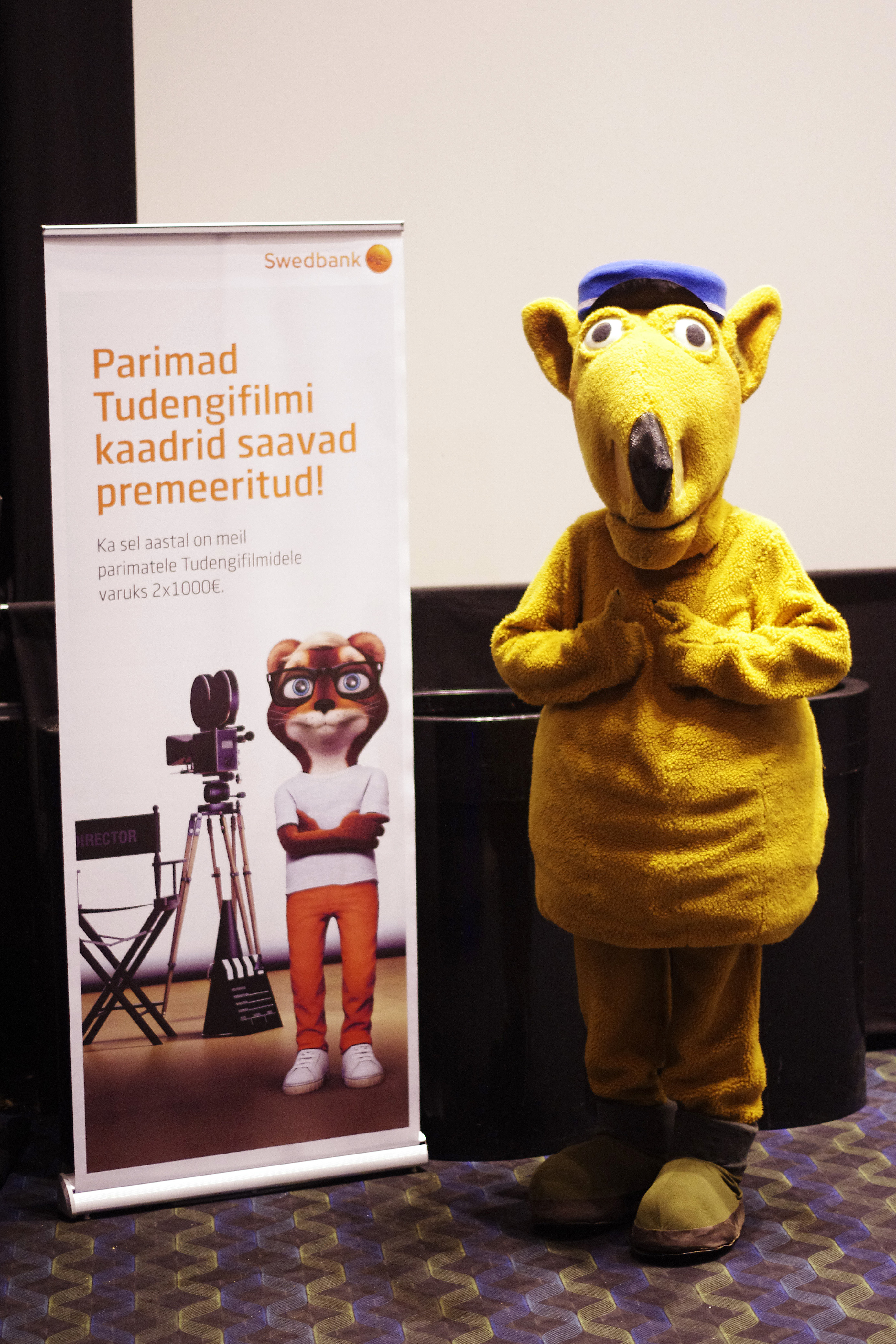 Tartu tudengipäevade tähtsündmuse Tudengifilmi finaal maskott Villemiga